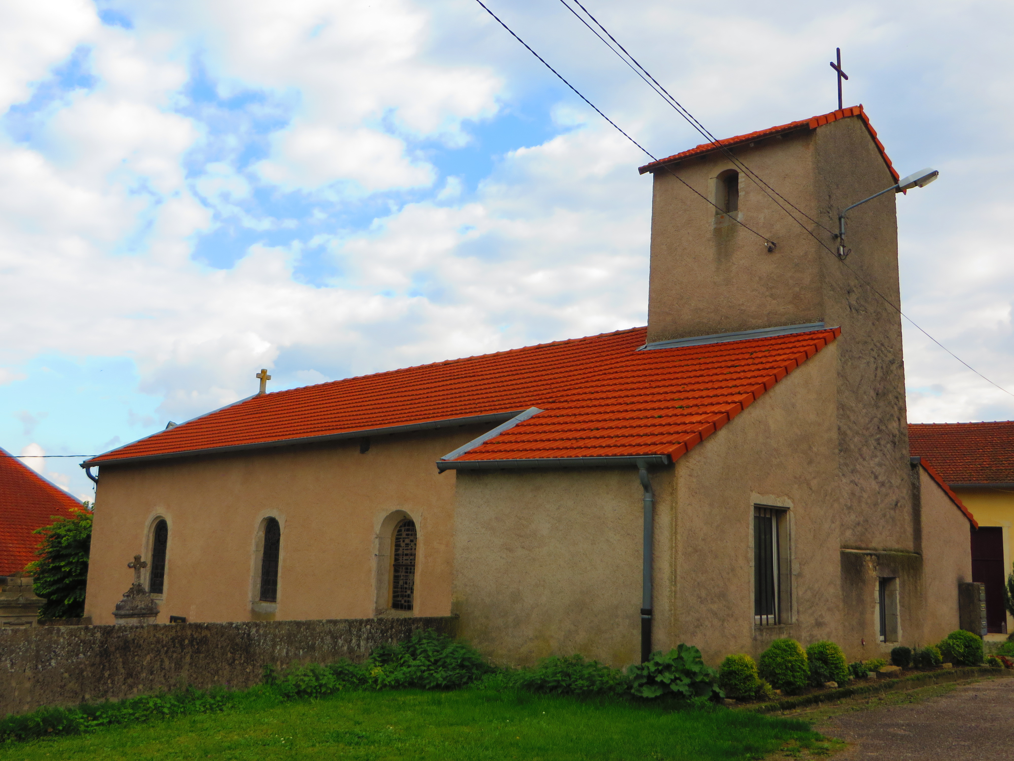 Oriocourt Église Saint-Jean-Baptiste